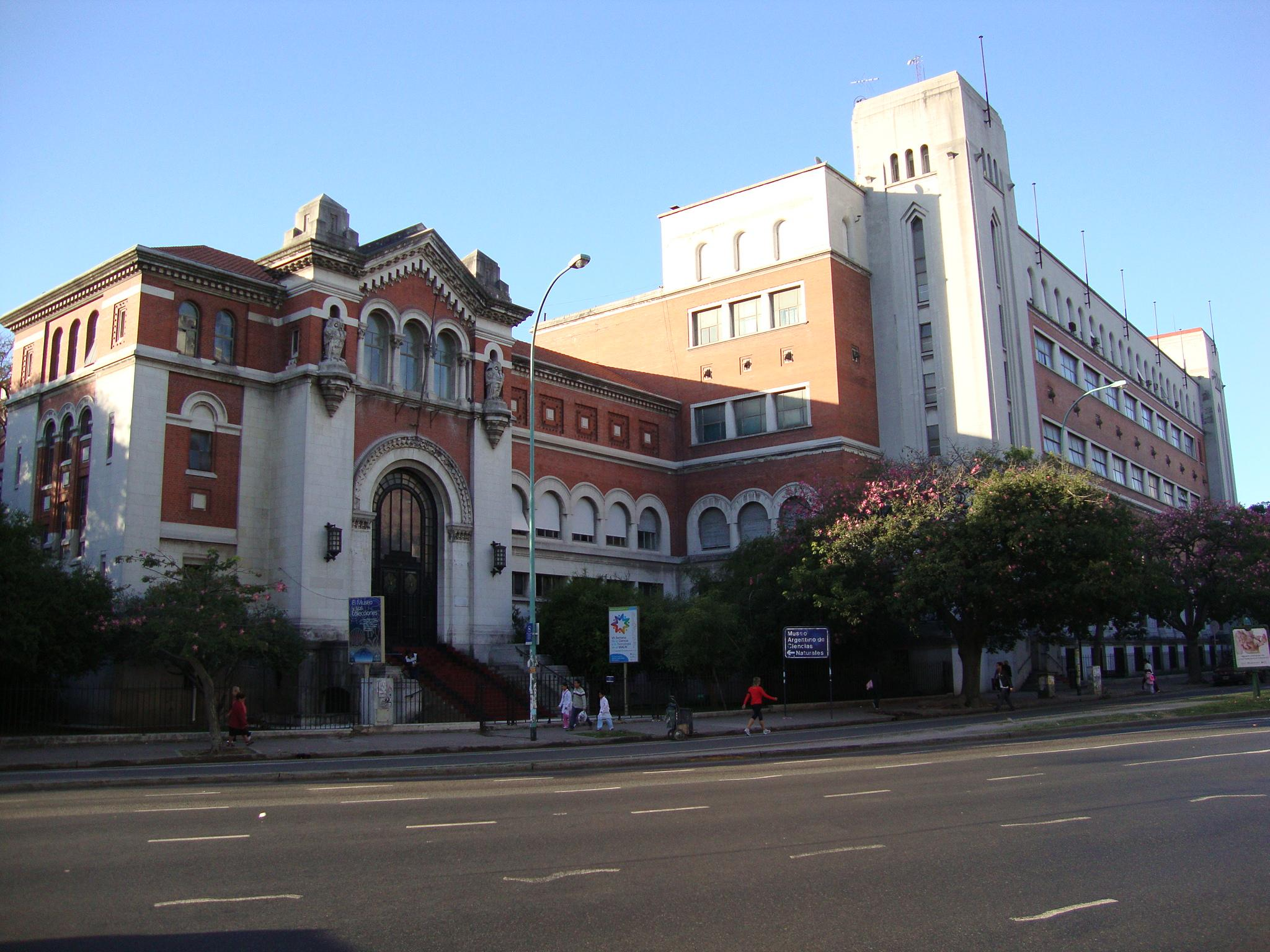 Edificio del Museo Nacional de Ciencias Naturales "Bernardino Rivadavia", inaugurado en uno de los bordes del Parque Centenario en 1929. Se destaca su arquitectura ecléctica, combinando elementos góticos, como los arcos apuntados; con detalles pintorescos como las esculturas de búhos y la reja del portón, que imita a una tela con una araña. Buenos Aires, Argentina.